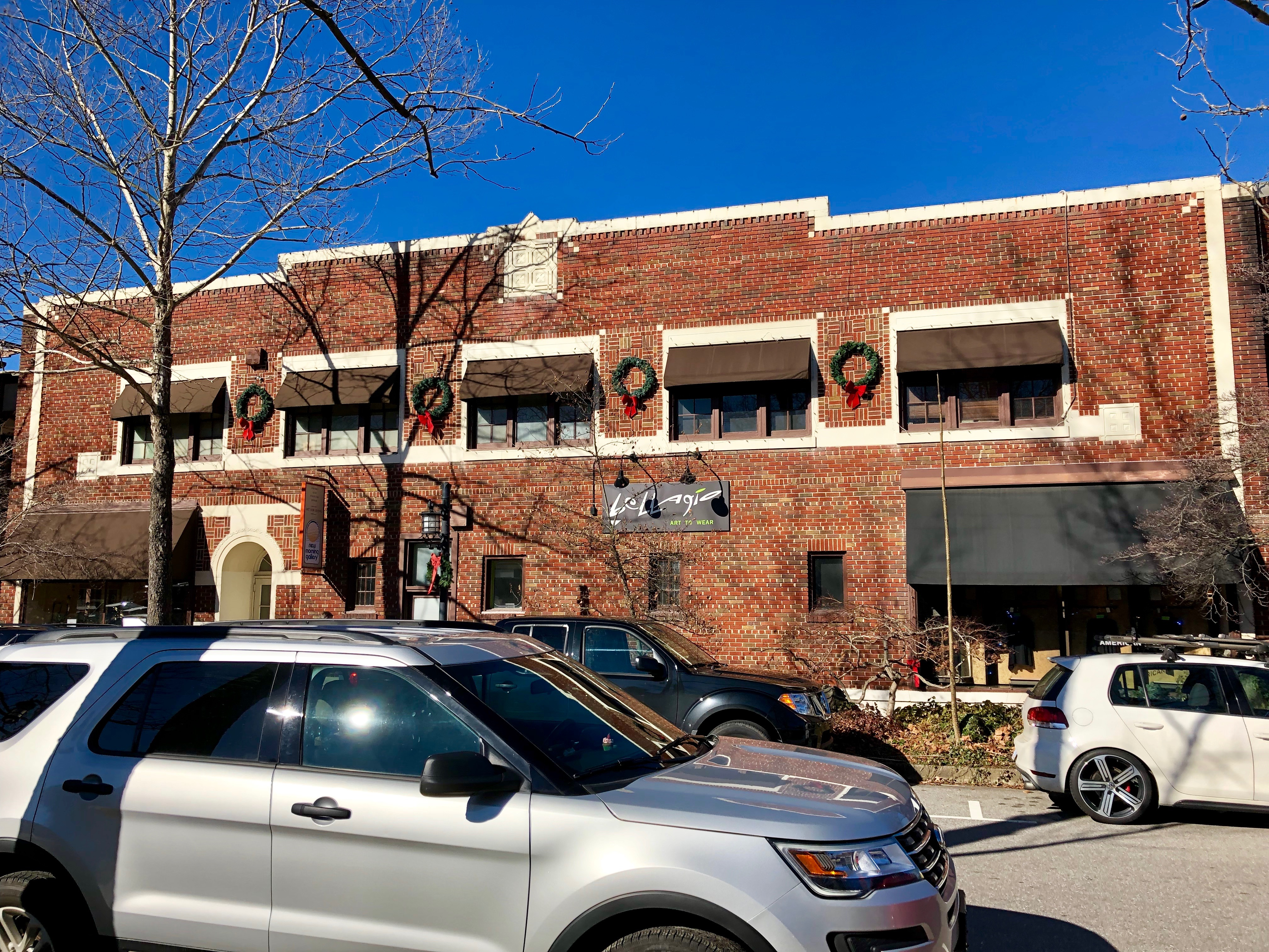 Biltmore Plaza, Biltmore Village, NC